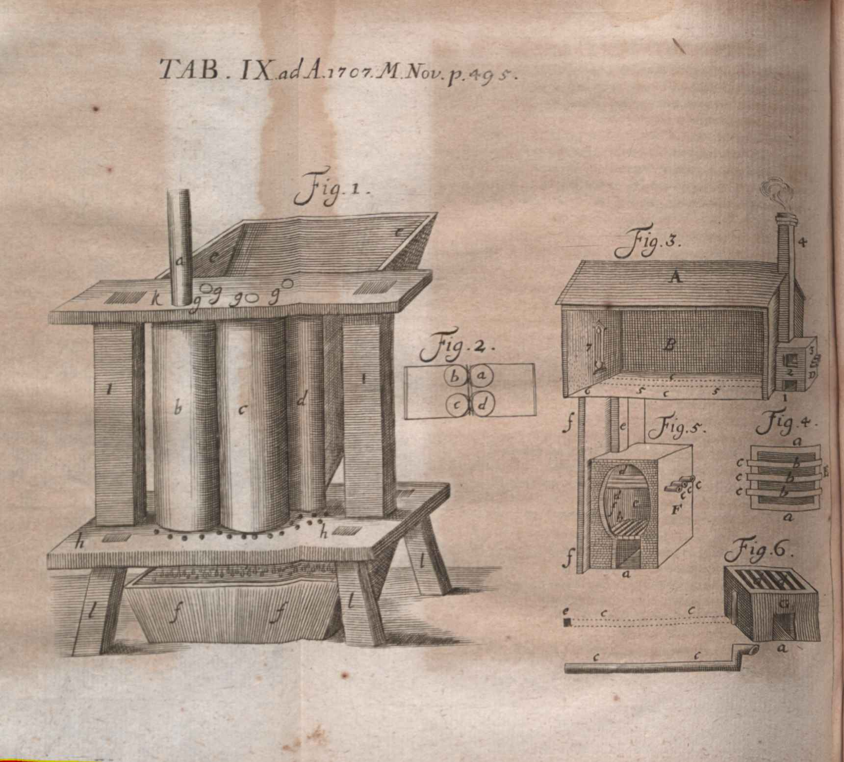 Illustration